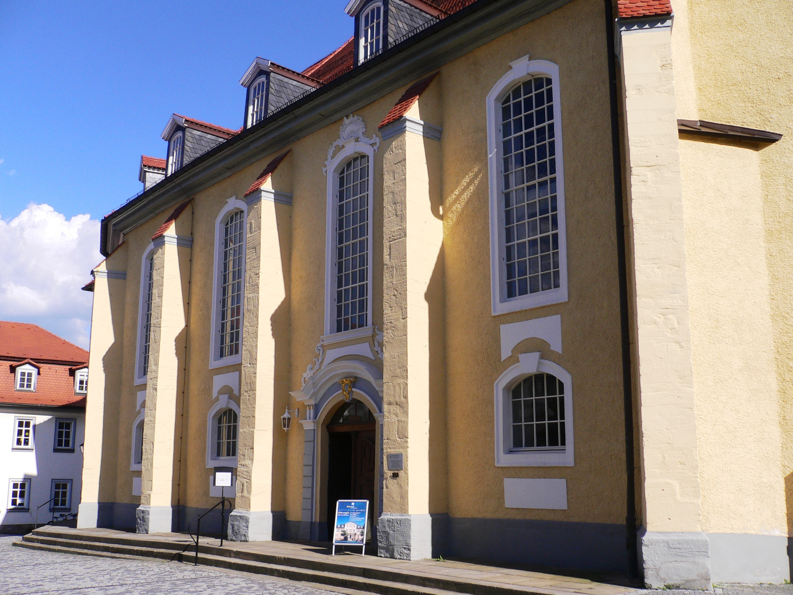 Die Ilmenauer Stadtkirche St. Jakobus (evangelisch, auch St.-Jakobus-Kirche in Ilmenau)